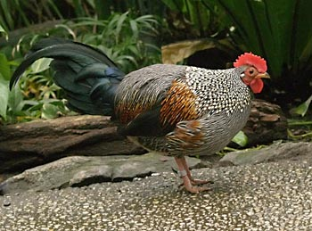 Sonnerathuhn im Tierpark Berlin